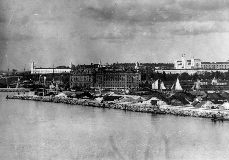 Konstantinopel, Internierungslager am Hafen Das Internierungslager der internierten deutschen Palästina-Truppen vor dem Rücktransport nach Deutschland.